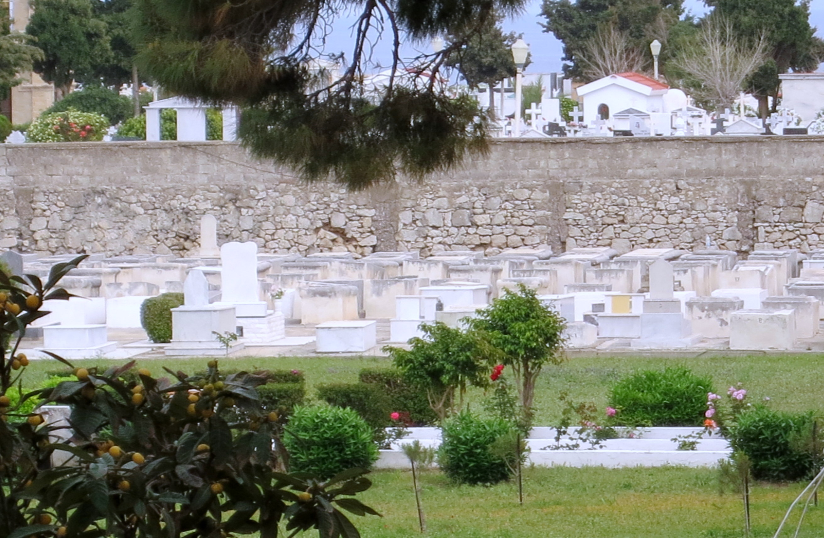 Blick in den neuen jüdischen Friedhof 02